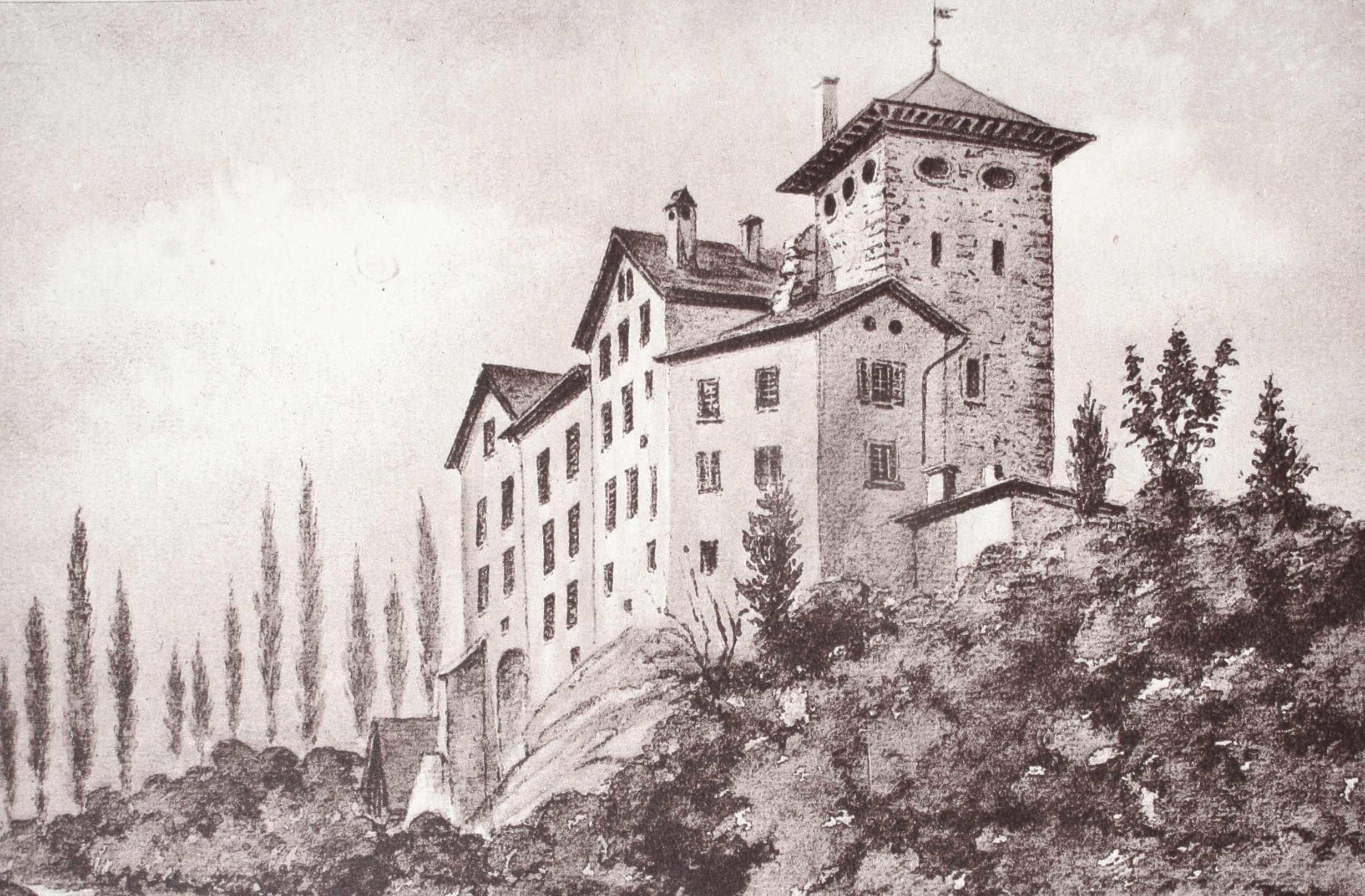 {Schloss Rietberg Zeichnung von F. Küpfer, 1880